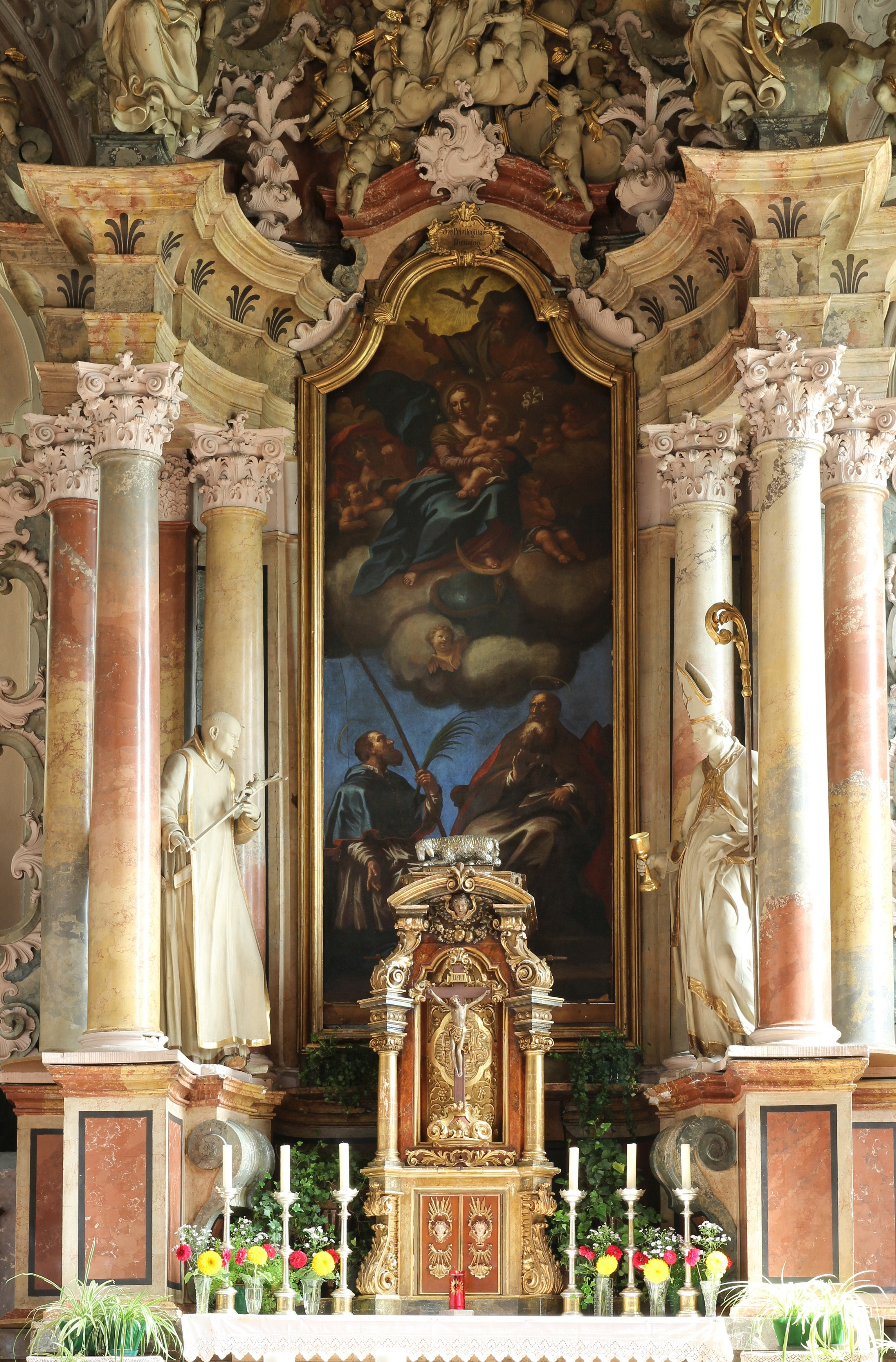 Hauptaltar der Pfarrkirche St. Zeno in Naturns